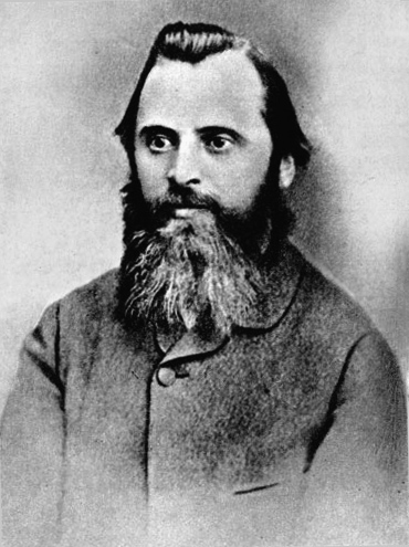 Милий Балактрев